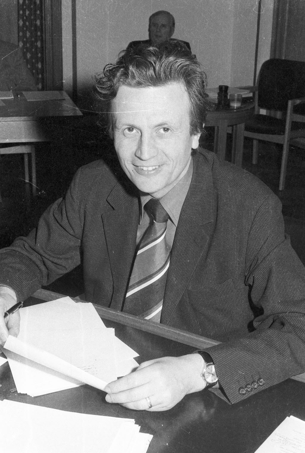 in der Ratsversammlung.